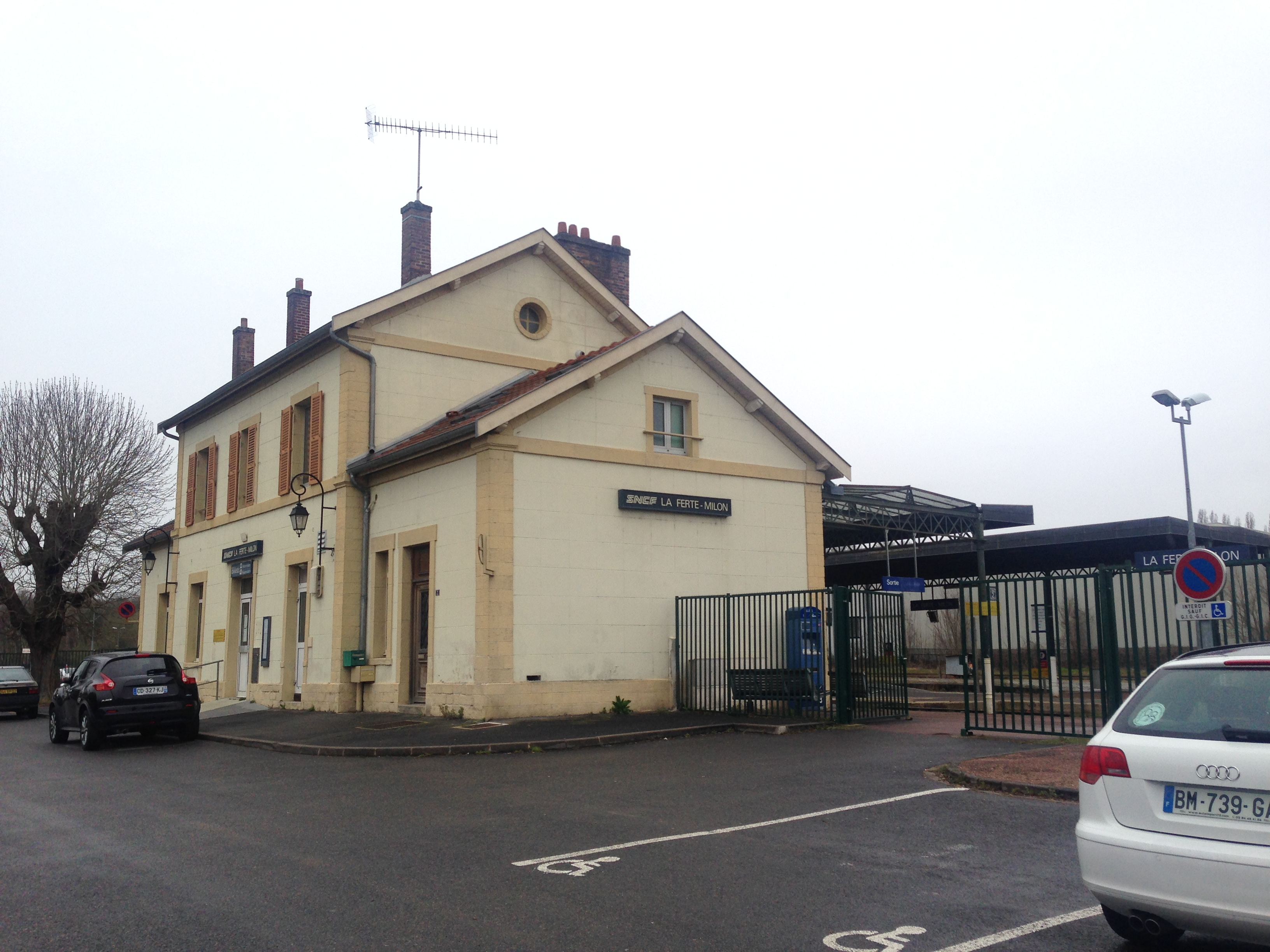 Gare de La Ferté-Milon-2016